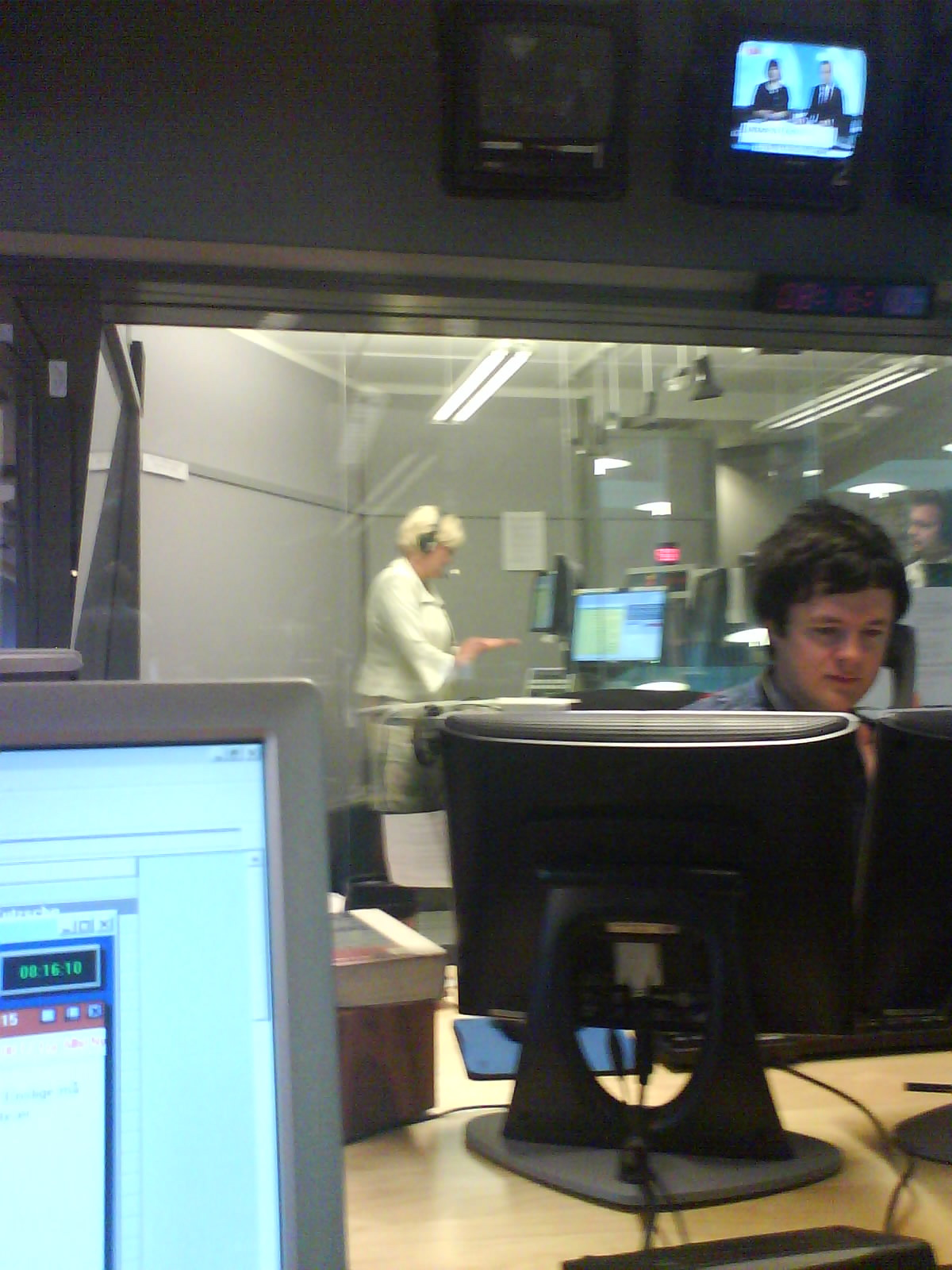 NRK Alltid Nyheters studio, Marienlyst. I studio Kristin Halvorsen under partilederutspørringen på Alltid Nyheter/P2 i forbindelse med valgkampen i 2007